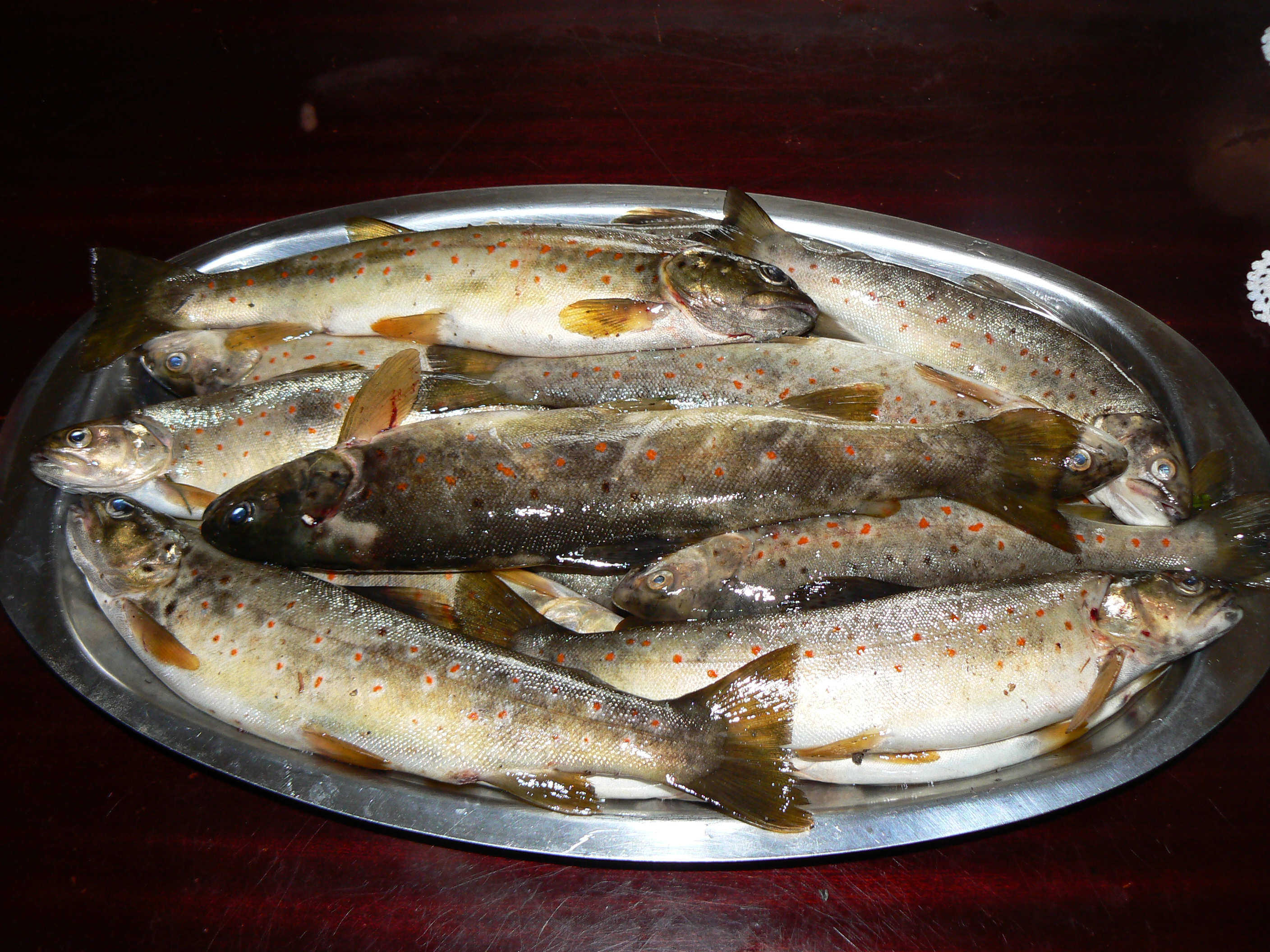 PLATO DE TRUCHAS (SALMO TRUTTA) ORIGINARIAS DEL RÍO CORNEJA (ÁVILA, ESPAÑA)